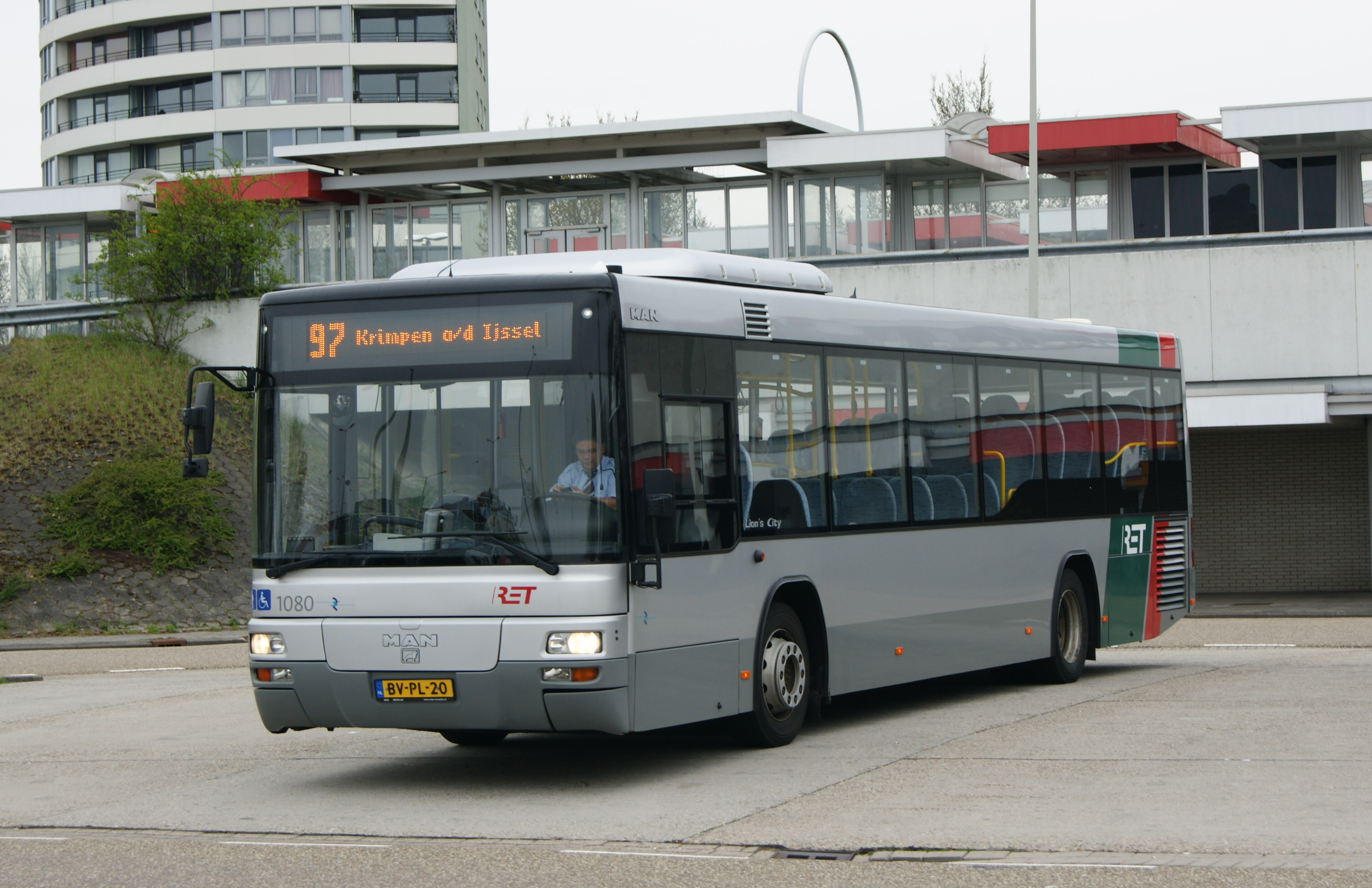 De 1080 staat op de buffer bij metrostation Capelsebrug.